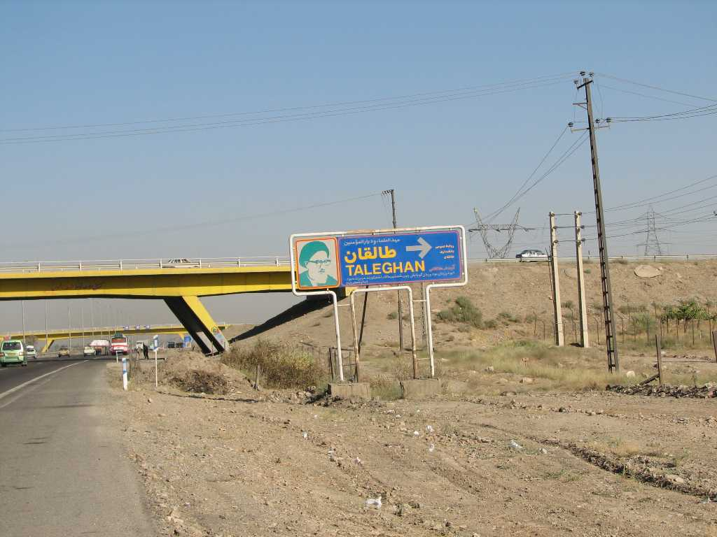 ورودی جاده طالقان. کیلومتر 90 بزرگراه کرج - طالقان